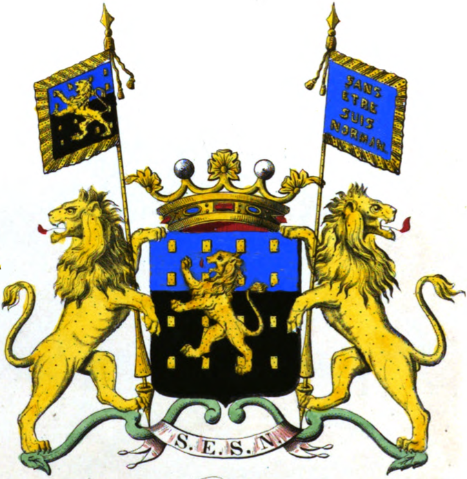 Armoiries de la famille de Norman et d'Audenhove